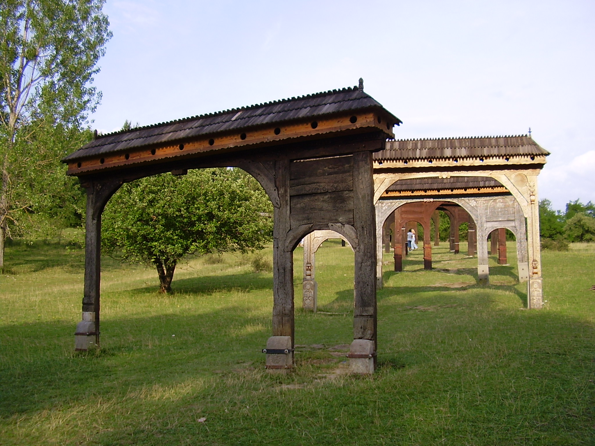 Szejkefürdői székelykapuk Orbán Balázs síremlékénél (Székelyudvarhely)